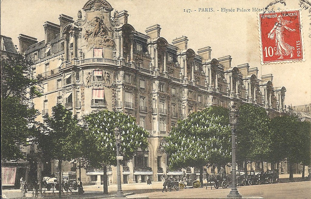 Carte postale ayant circulé en 1909. L'Élysée-Palace hôtel, 103 avenue des Champs-Élysées (Paris, 8e arrond) et la station de métro Alma (devenue Georges V en 1920).